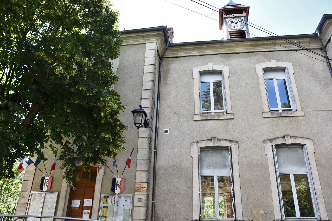 département de la Drôme